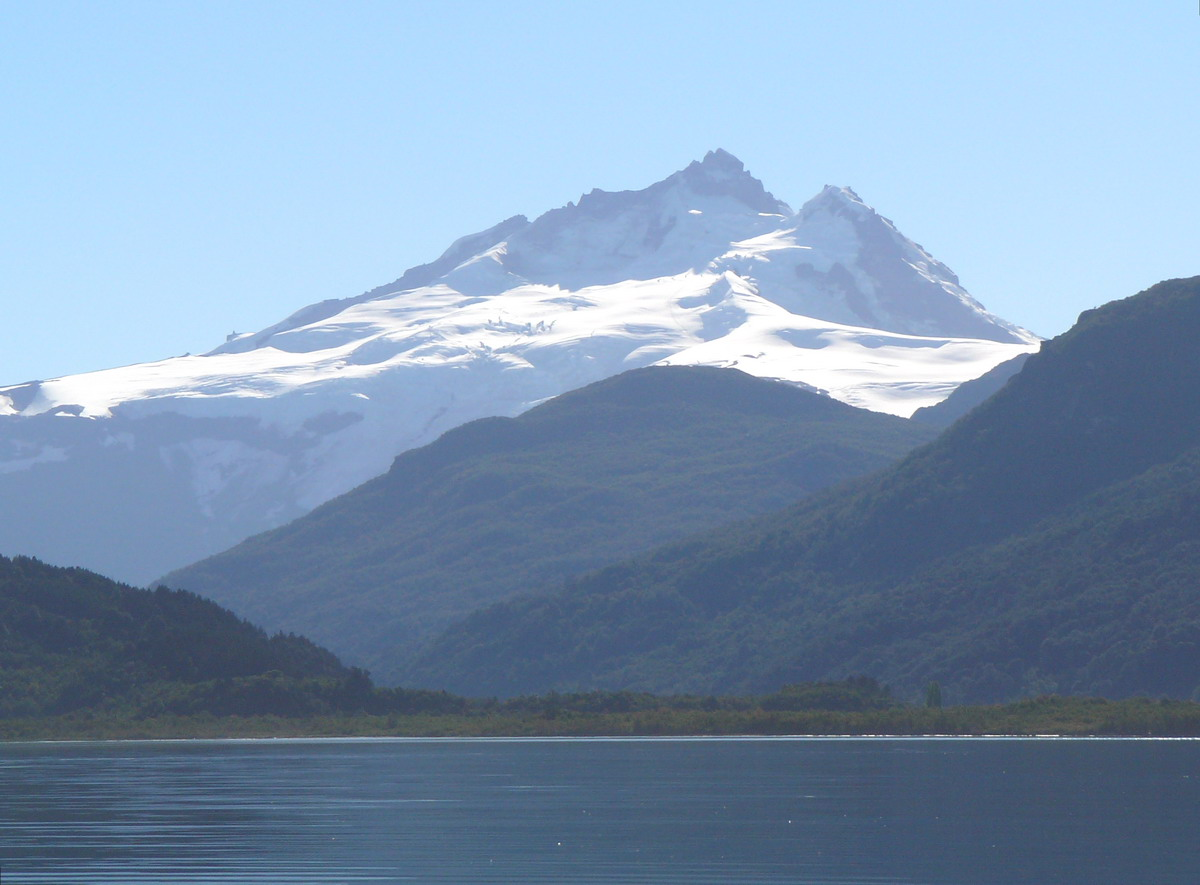 Il lago Mascardi e il Cerro Tronador